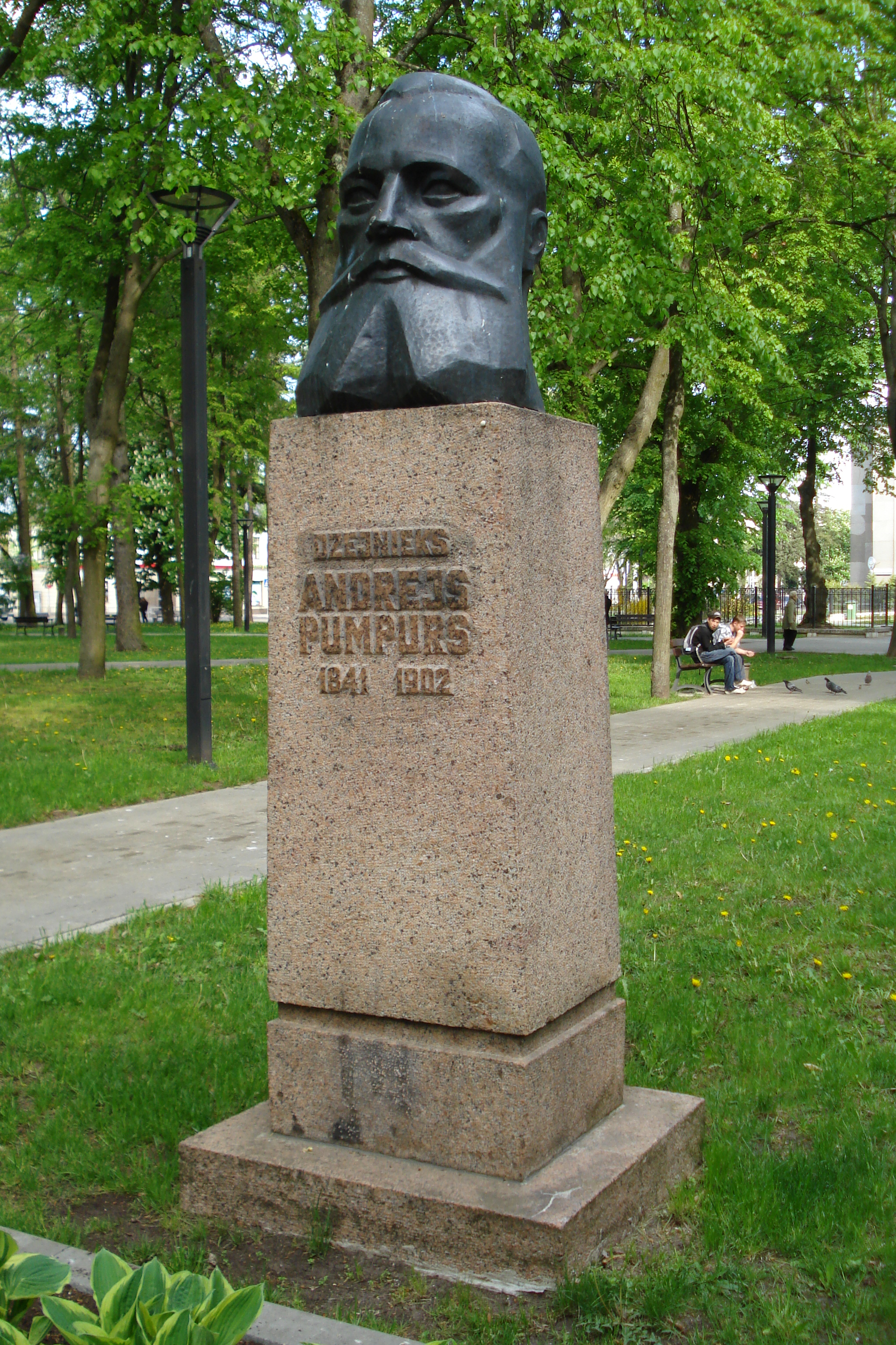 Bust of Andrejs Pumpurs (1841-1902), Latvian poet in Daugavpils. Created by tēlniece J. Volkova, скульптор Елена Волкова. Andreja Pumpura (1841.–1902.) krūšutēls.